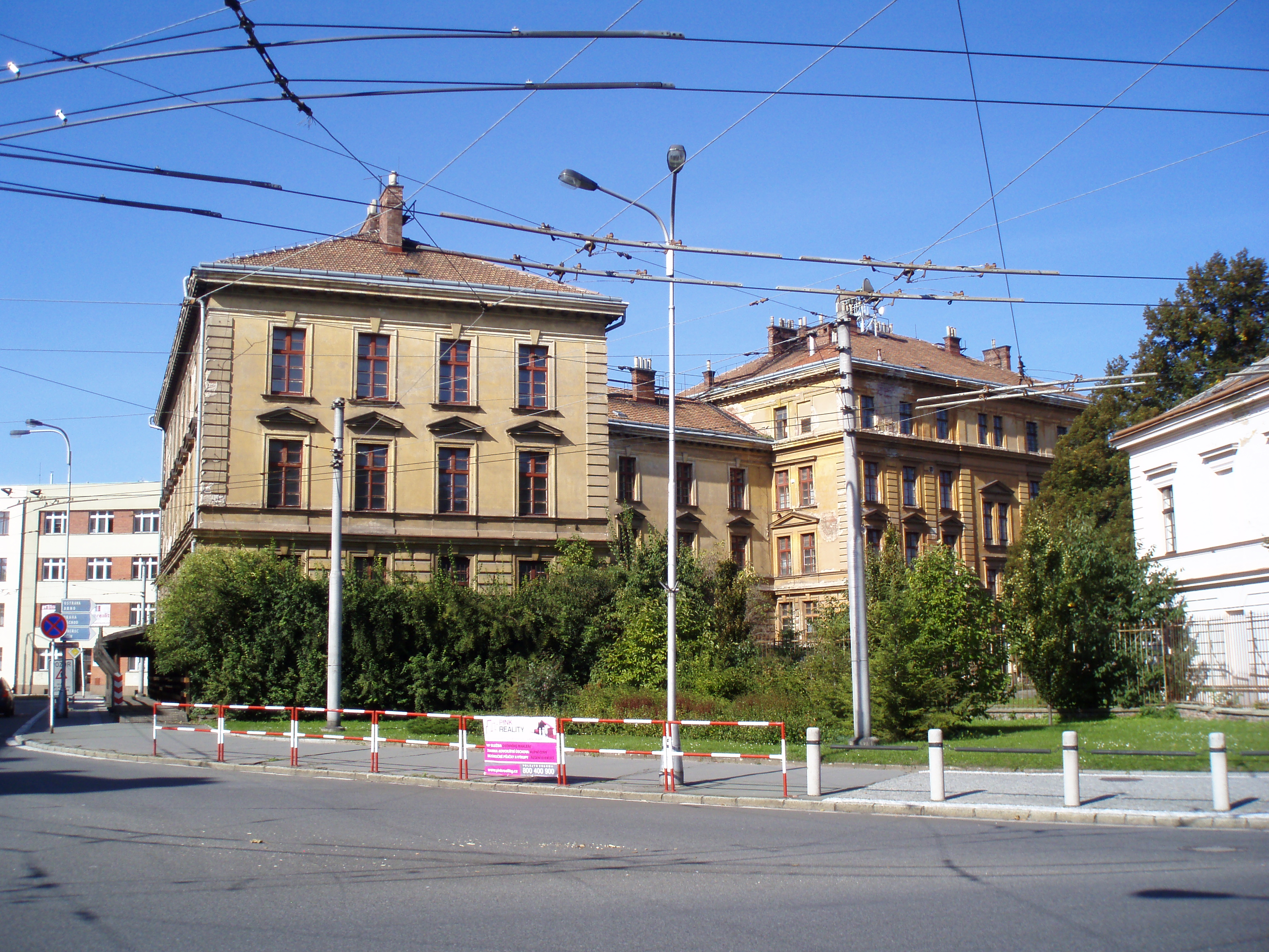 Vrbenského kasárna a výkroj, kde stál památník padlým příslušníkům pěšího pluku č. 4 Prokopa Velikého (Hradec Králové)